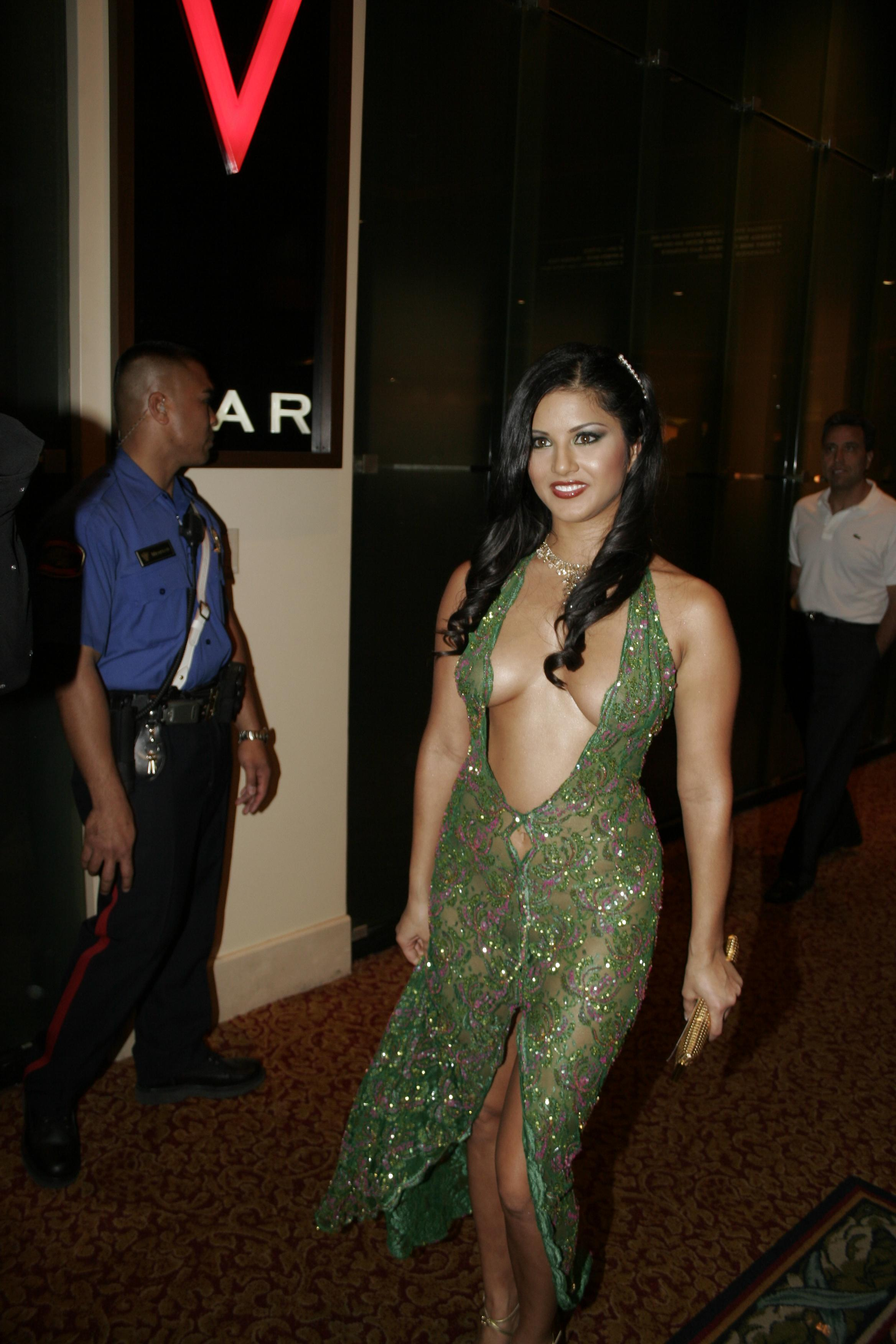 _MG_6335